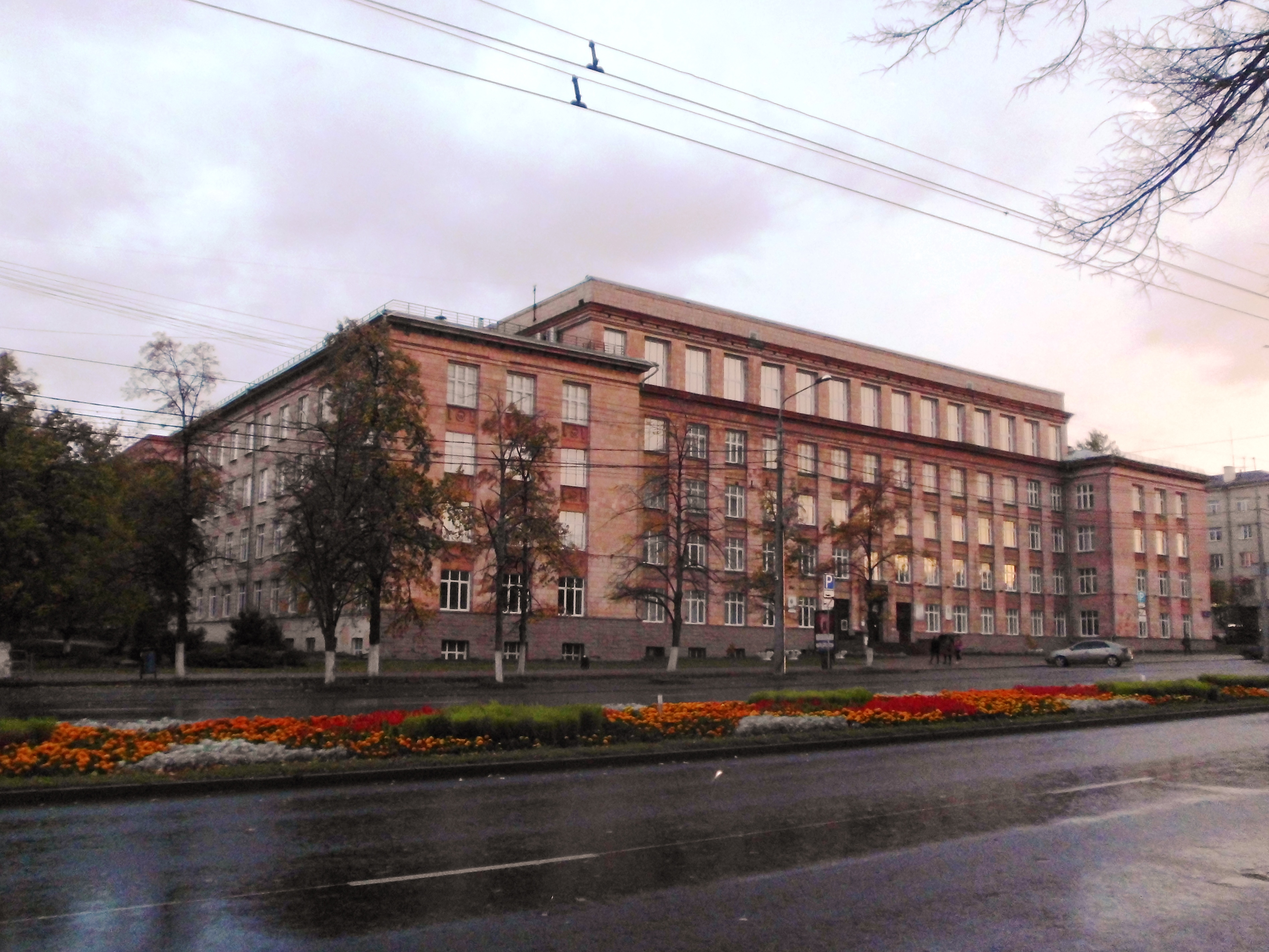 Здание главного корпуса Южно-Уральского государственного аграрного университета. Город Челябинск, проспект Ленина, 75.